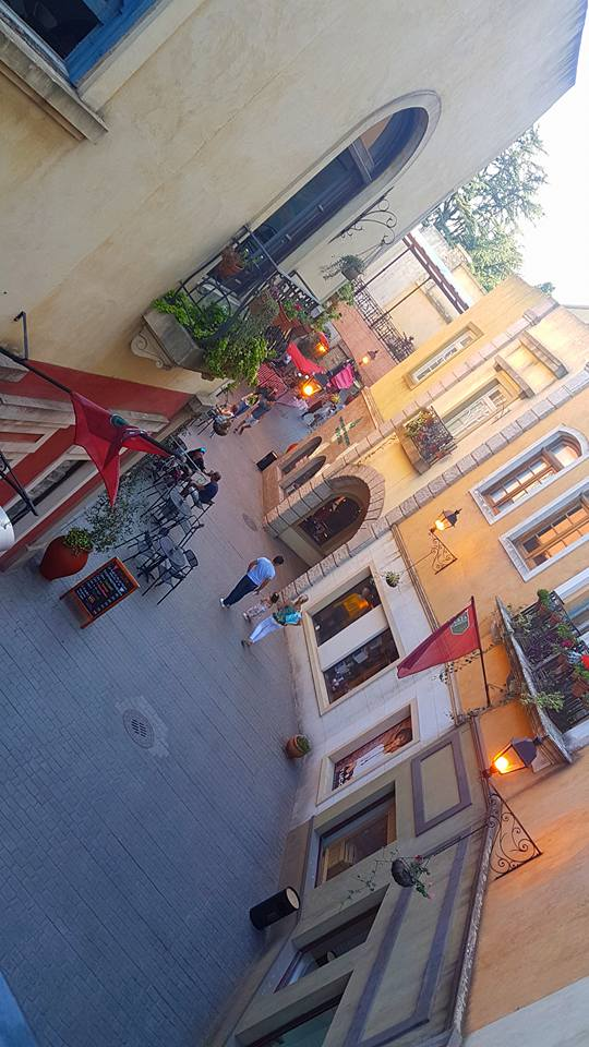 Shopping de Canning